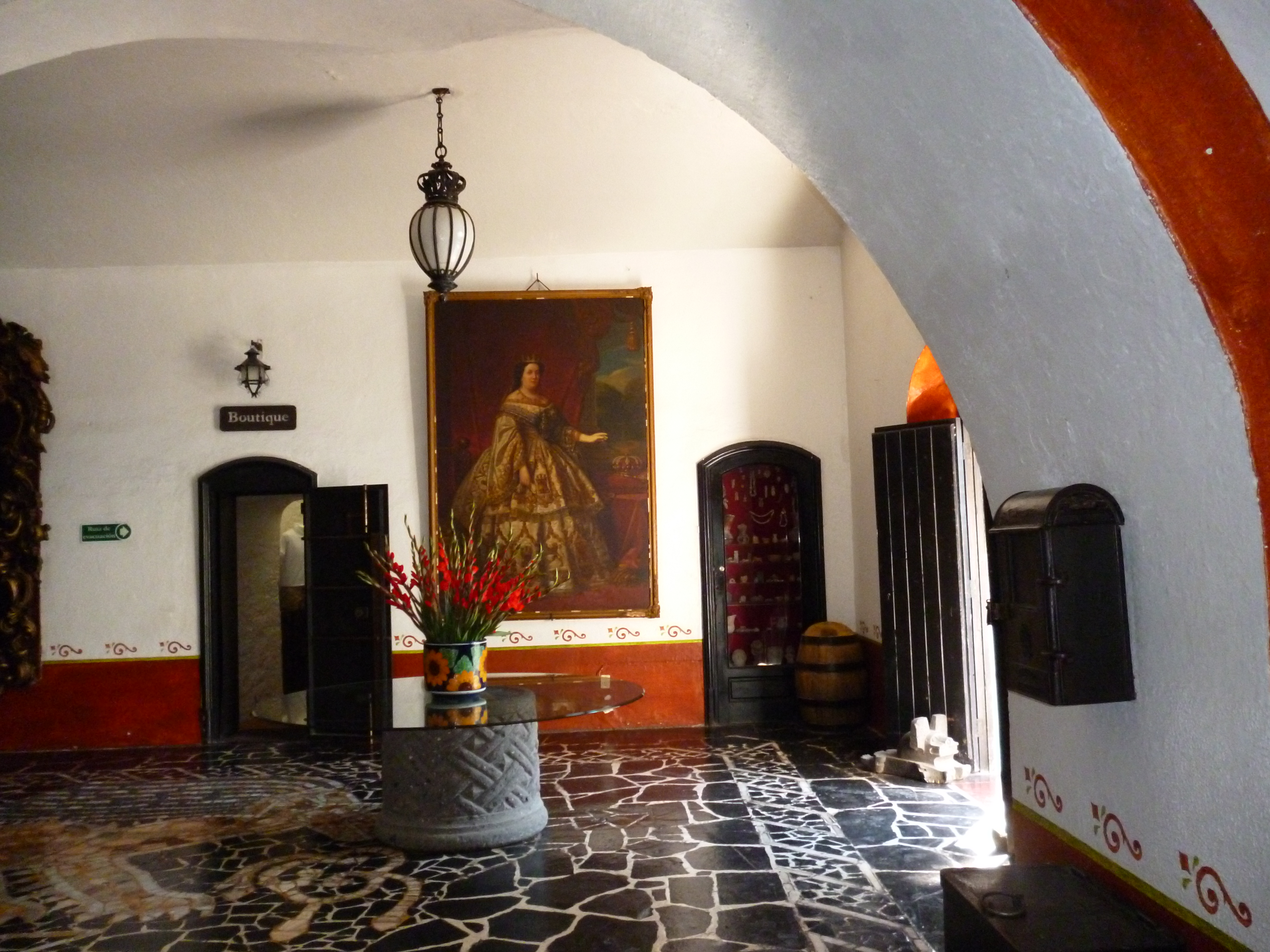 entrada a la Hacienda Vista Hermosa, ubicada en el pueblo que Tequesquitengo, Morelos, México. en ella se muestra un cuadro antiguo.